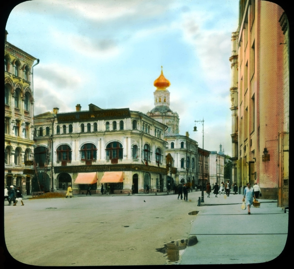 Биржевая площадь и Блюхеровский (современное название: Большой Черкаский) переулок